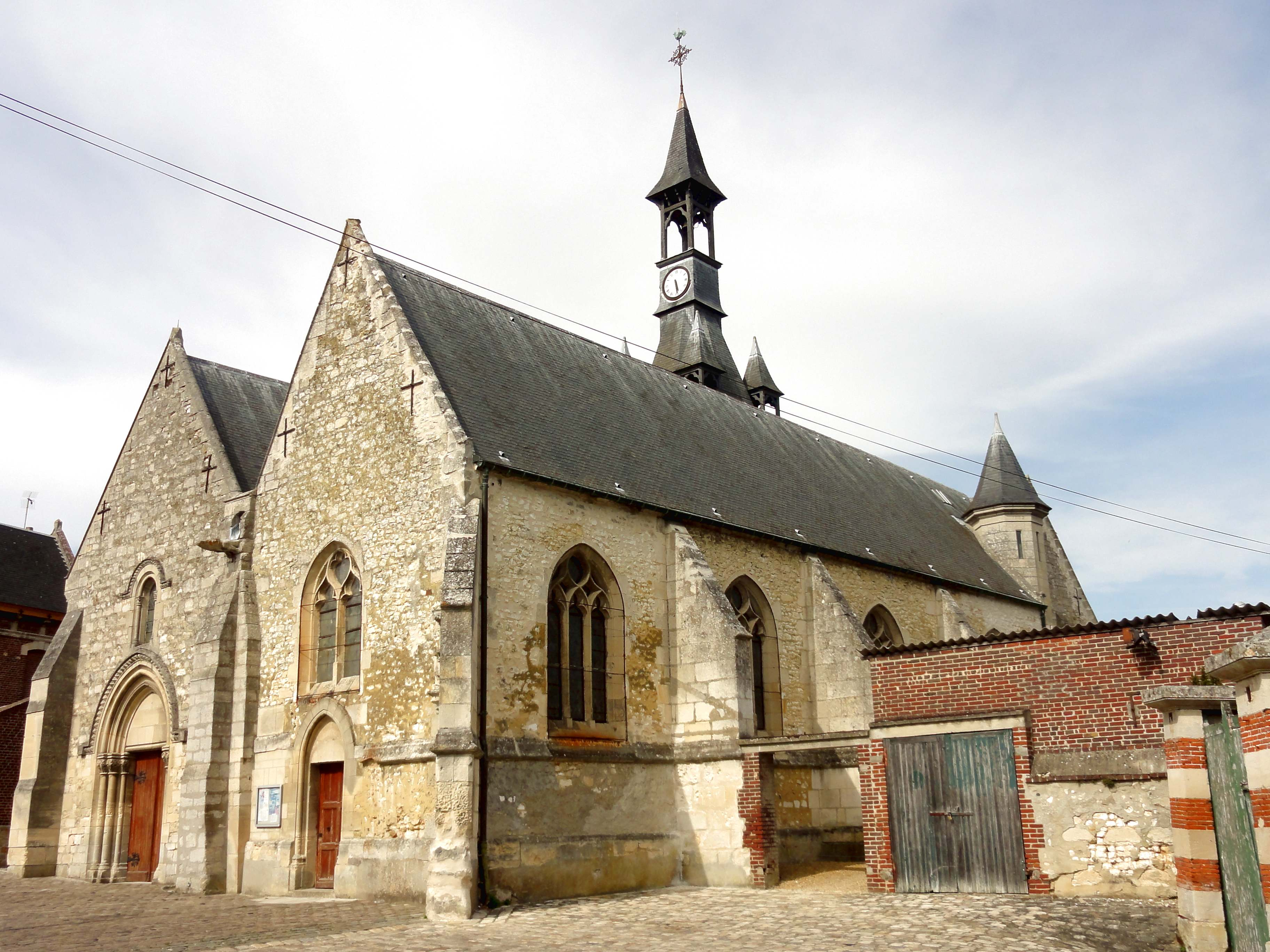 Église Saint-Pierre-et-Saint-Paul de Fitz-James (voir titre).